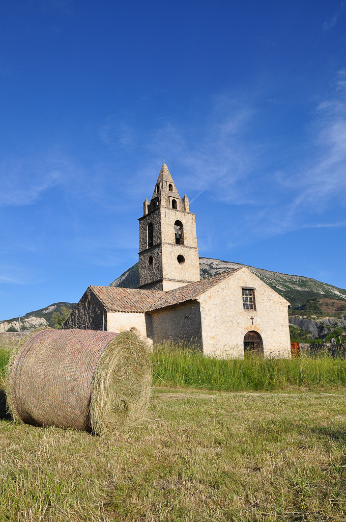 Vue de l'église de Tartonne